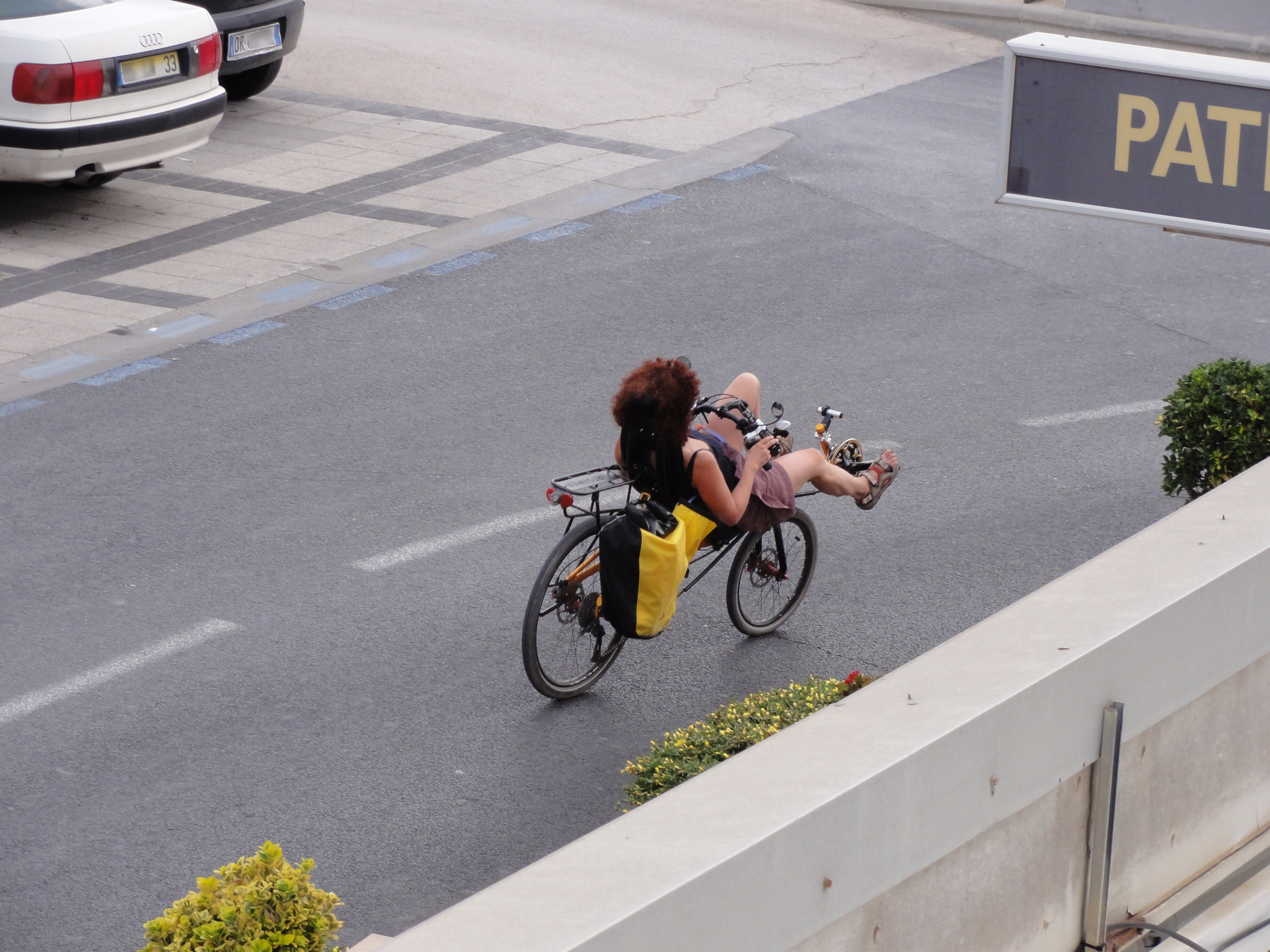 Vélo couché en utilisation de ville